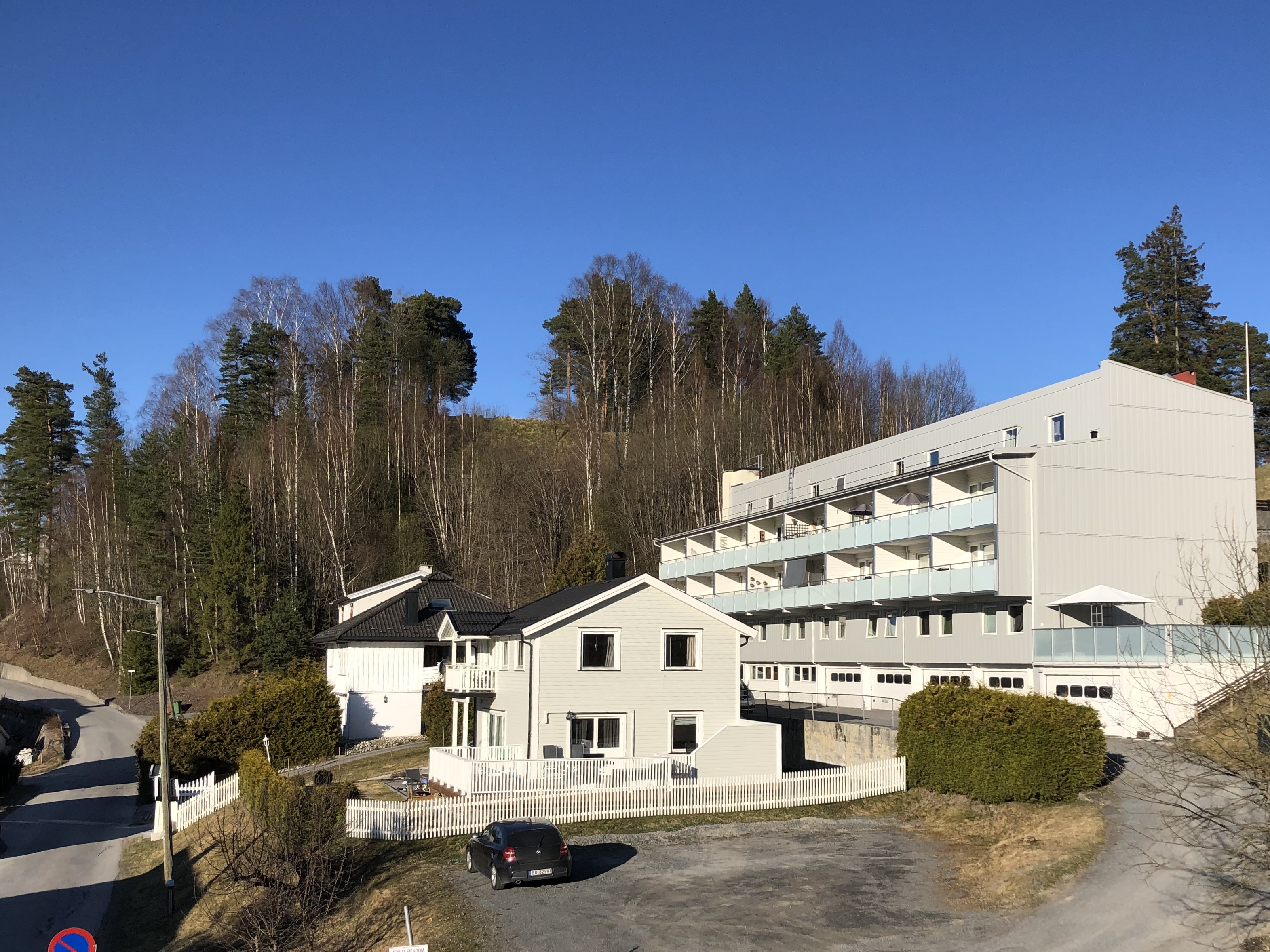 Hattemaker Knudsens vei, Hønefoss